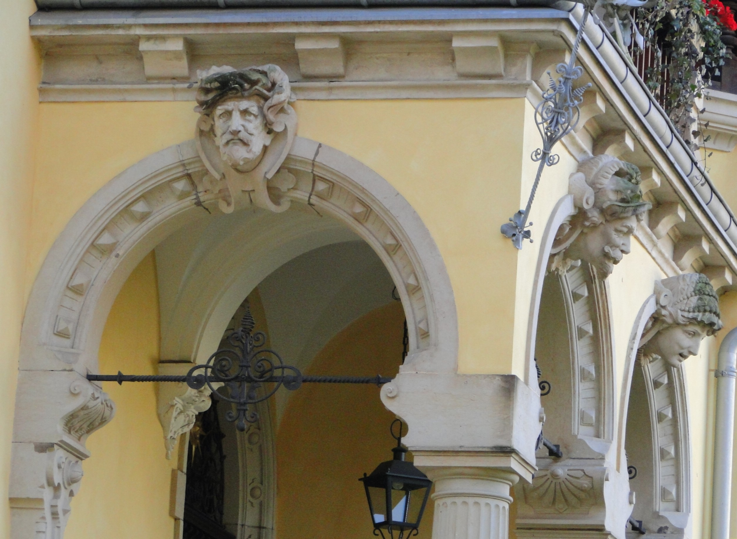 Die Villa Vogesenweg 4 in Dresden-Blasewitz, Detail